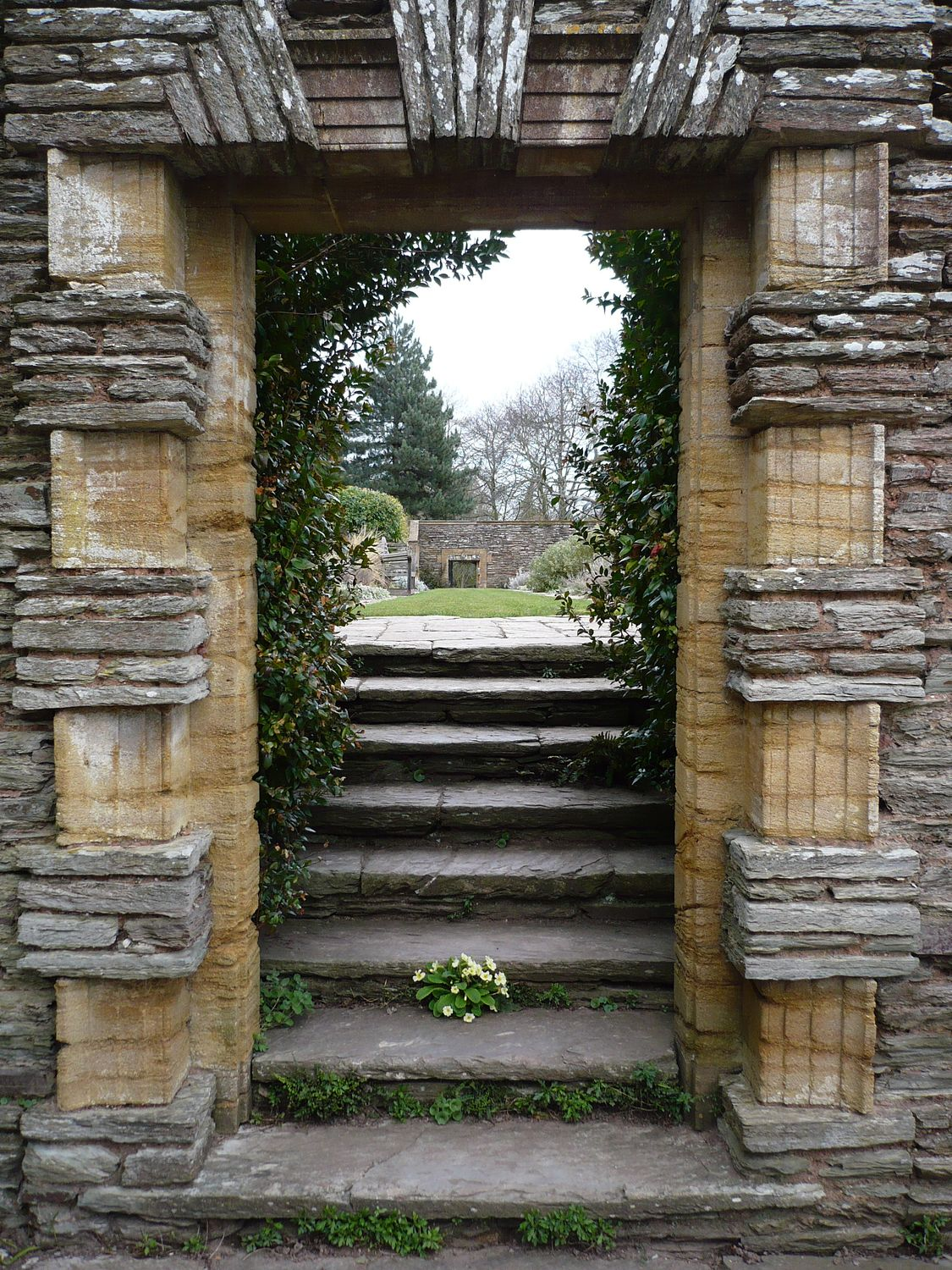 Durchgang in Hestercombe Gardens